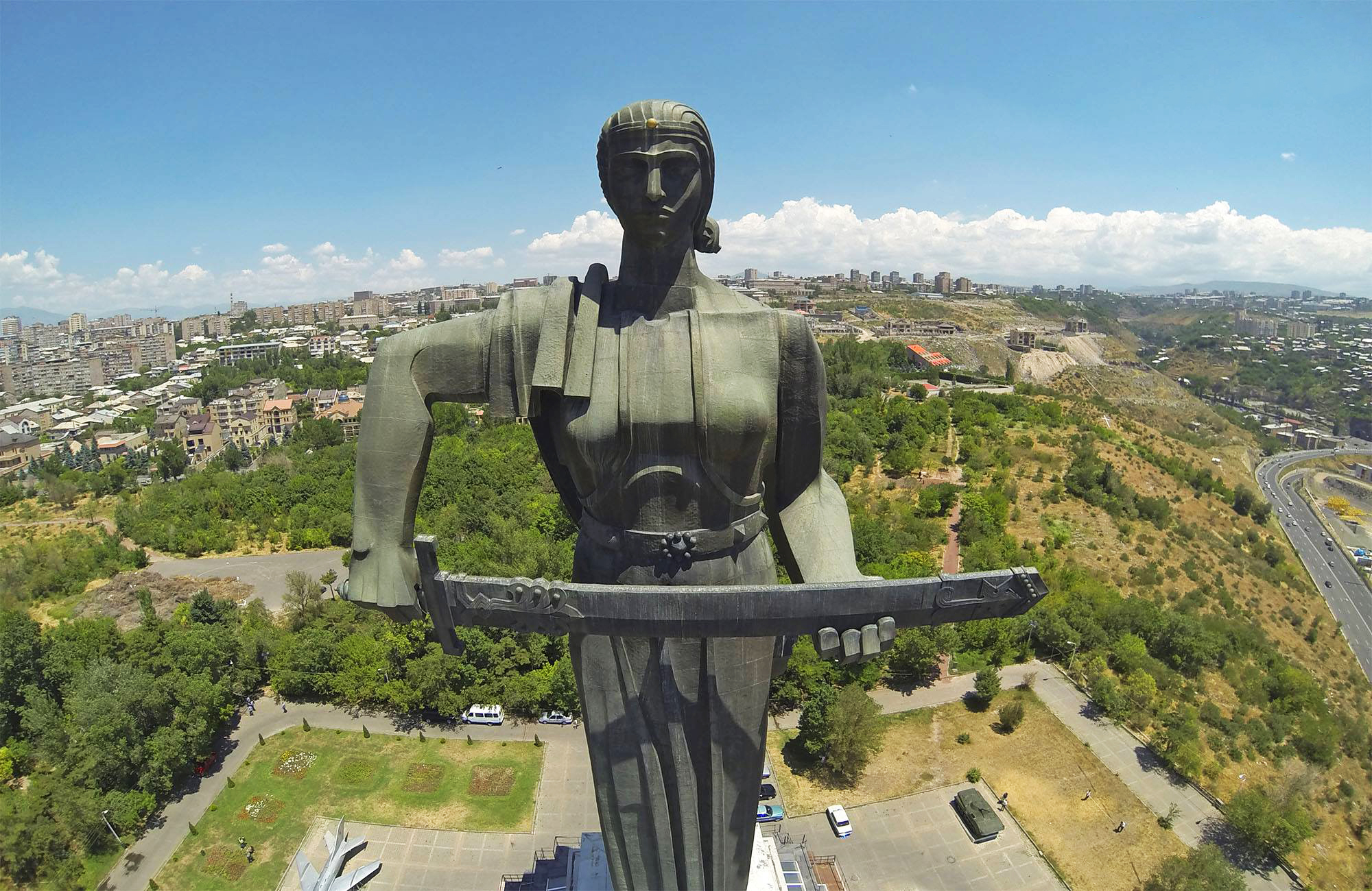 Մայր Հայաստան հուշարձան 360yerevan 12/10.3